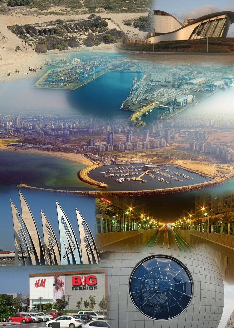 Collage of the city Ashdod photos links from wiki